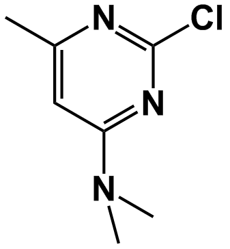 Krimidín, syntetické konvulzívum, rodenticíd.